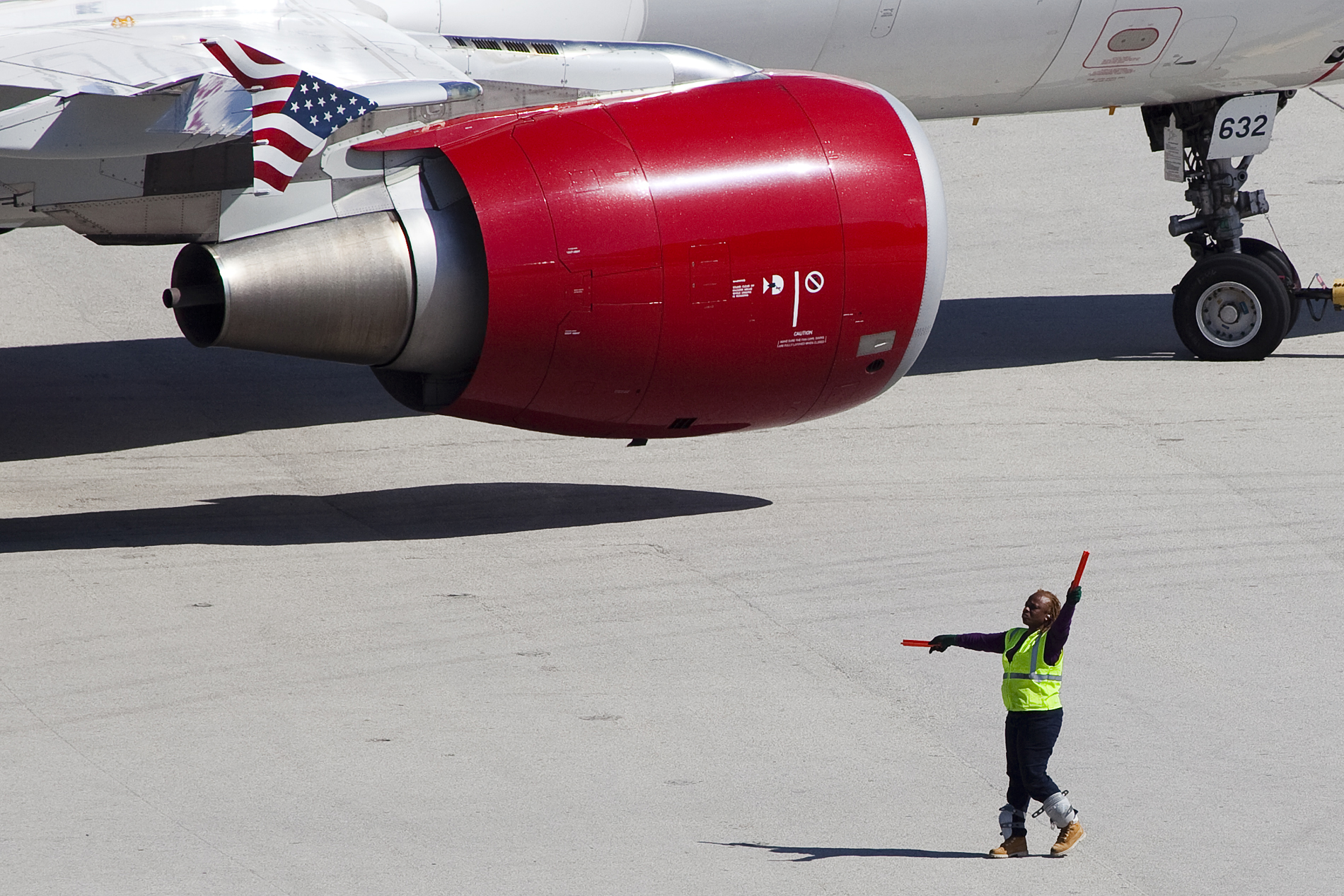 Miami-Fort Lauderdale